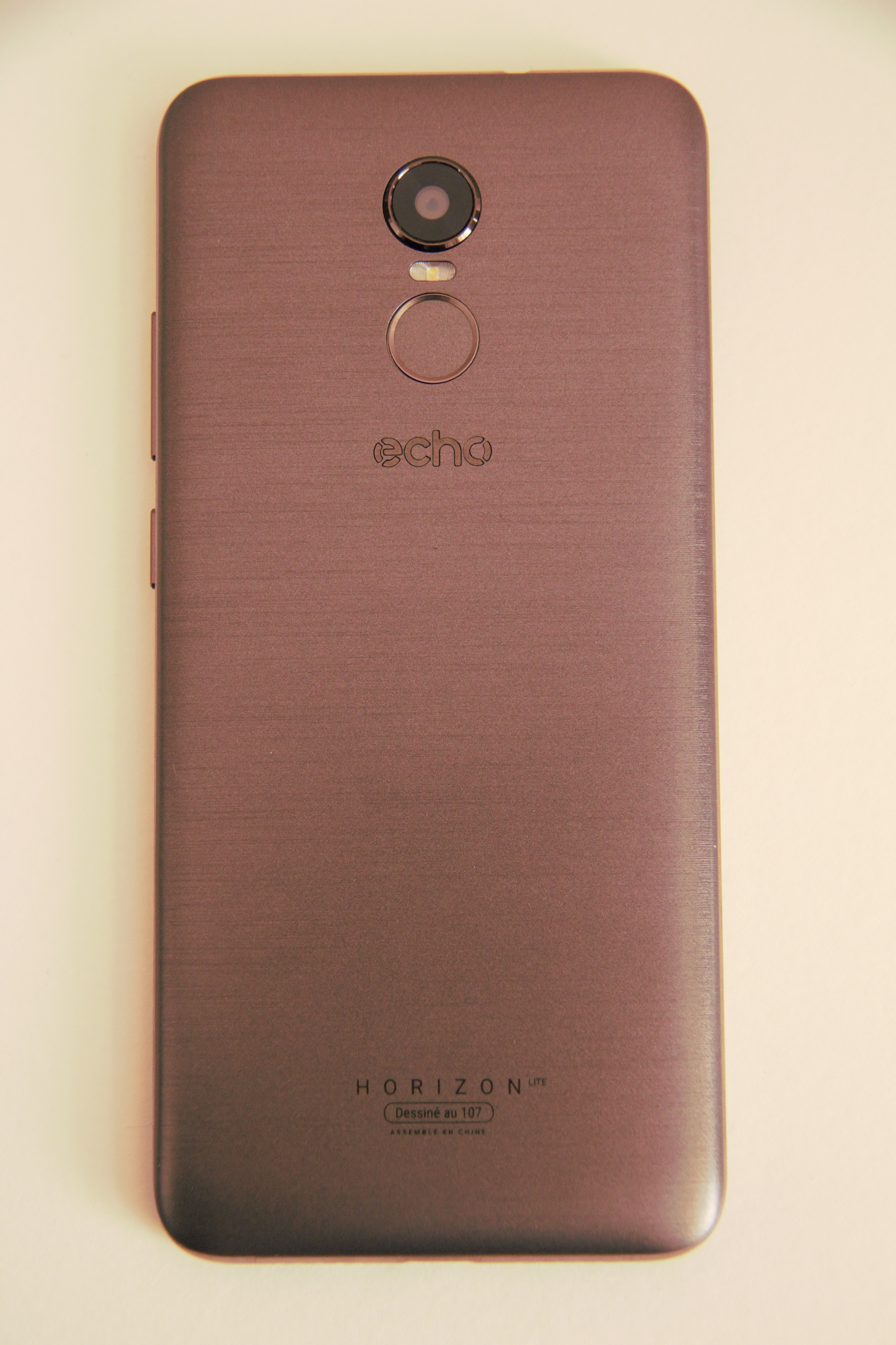 Echo Horizon Lite face arrière